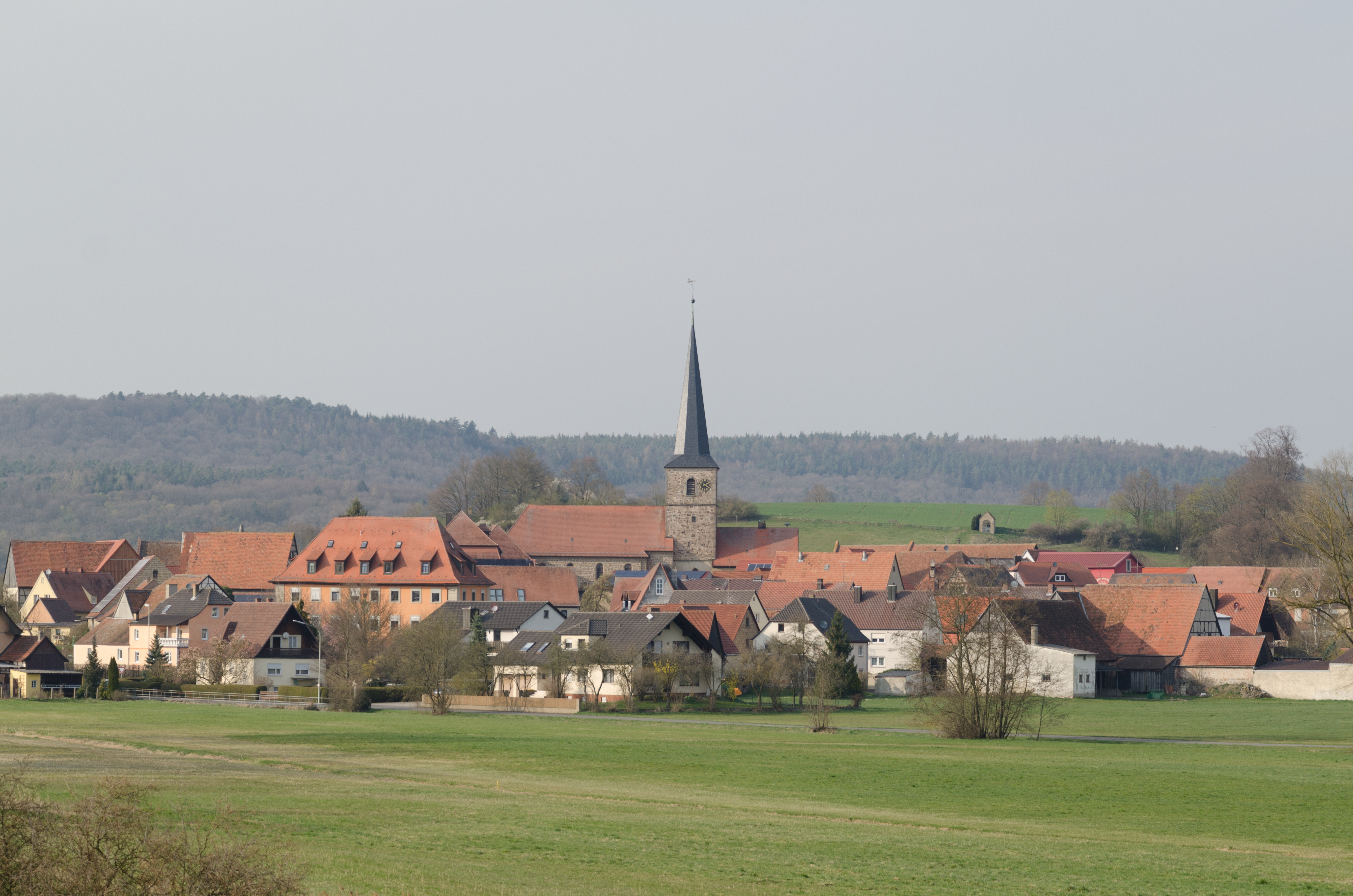 Oberscheinfeld, Panorama von Süden